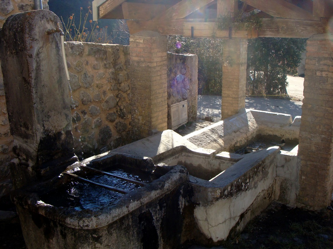 Le Saix (Hautes-Alpes) : fontaine et lavoir, au cœur du village.